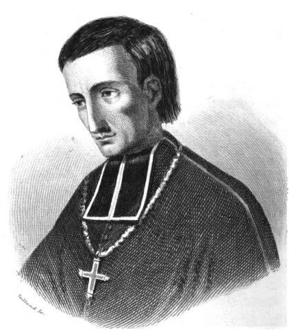 Porrait de Paul Dupont des Loges, 99ème évêque de Metz